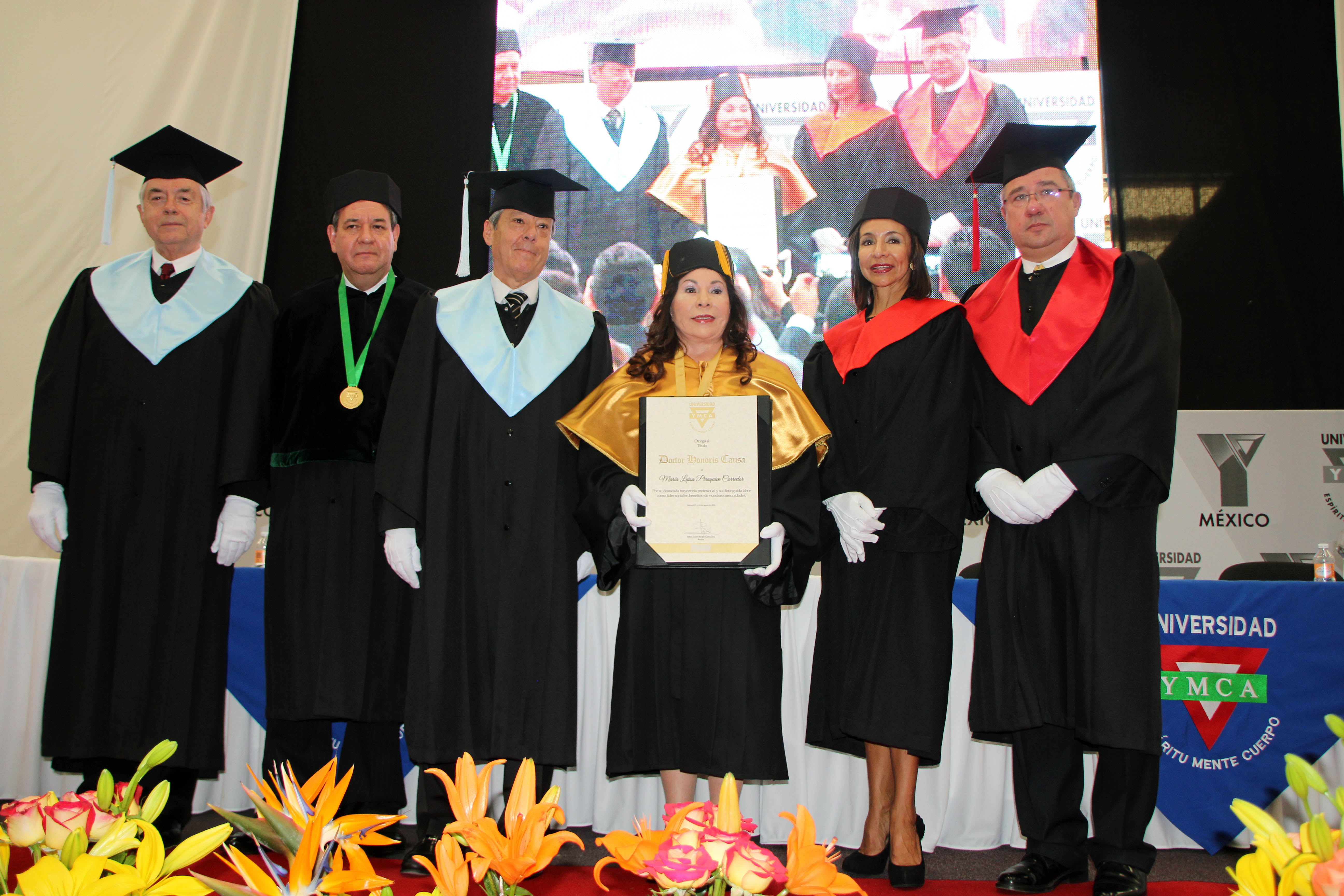 Doctorado Honoris Causa, Universidad YMCA - México, otorgado a la doctora María Luisa Piraquive